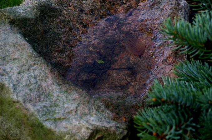 Horizontal water